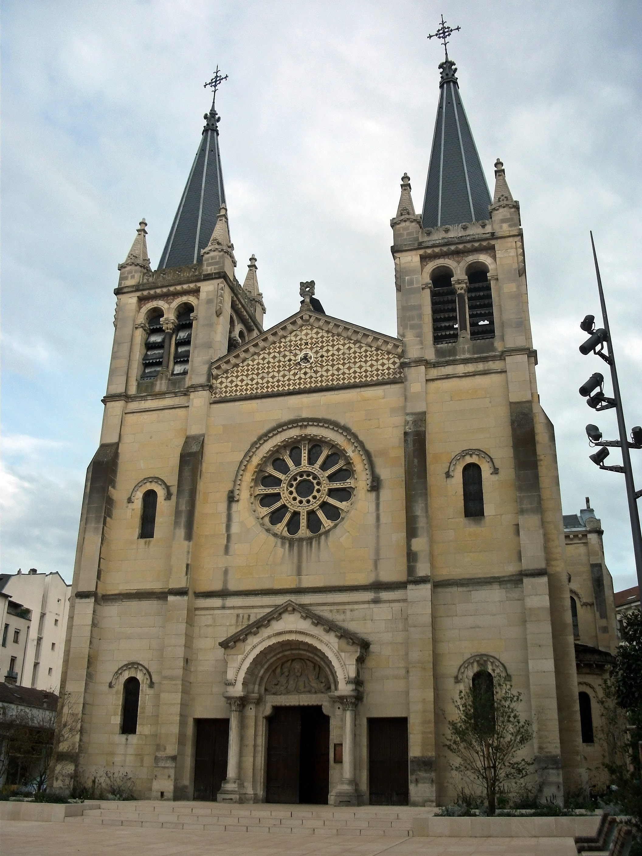 Église Saint-Louis de Vichy, Allier, Auvergne, France, après rénovation des toitures et du parvis.